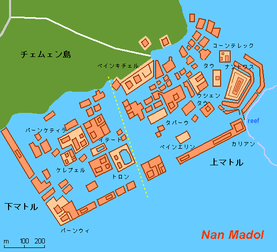 をもとに日本語に置き換えおよび微調整。